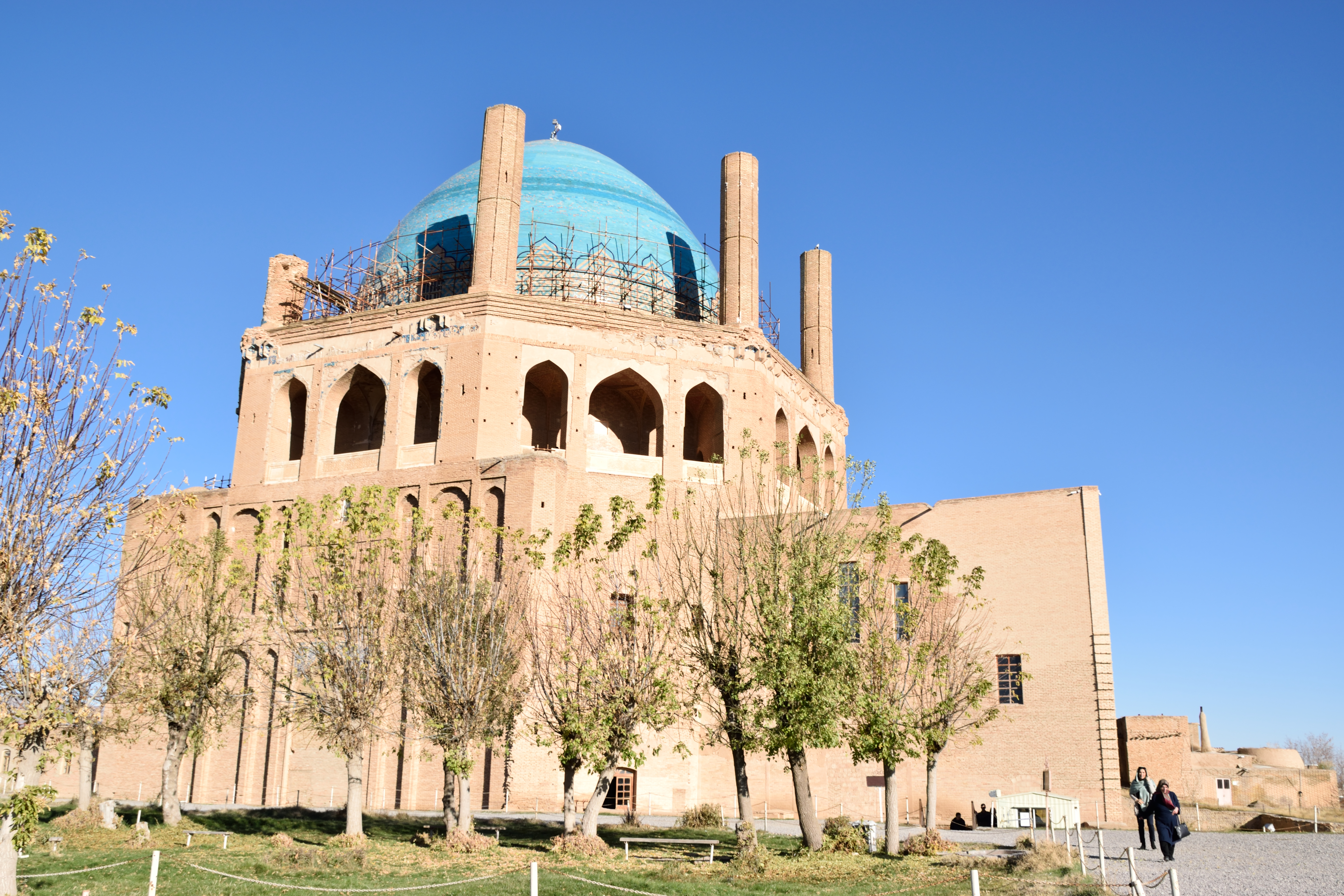 گنبد سلطانیه، مقبرهٔ اُلجایتو است که در ۱۳۰۲ تا ۱۳۱۲ در شهر سلطانیه (پایتخت ایلخانیان) ساخته شد و از آثار مهم معماری ایرانی و اسلامی به شمار می‌رود.